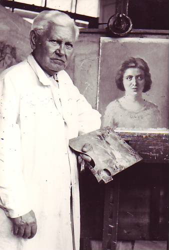 Akademický malíř František Antonín Jelínek v atelieru